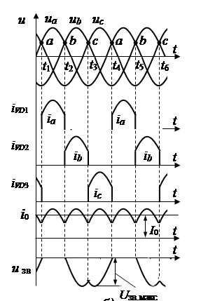 Часові діаграми струмів і напруг однопівперіодної схеми